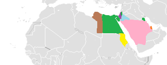 Sułtanat Egipski